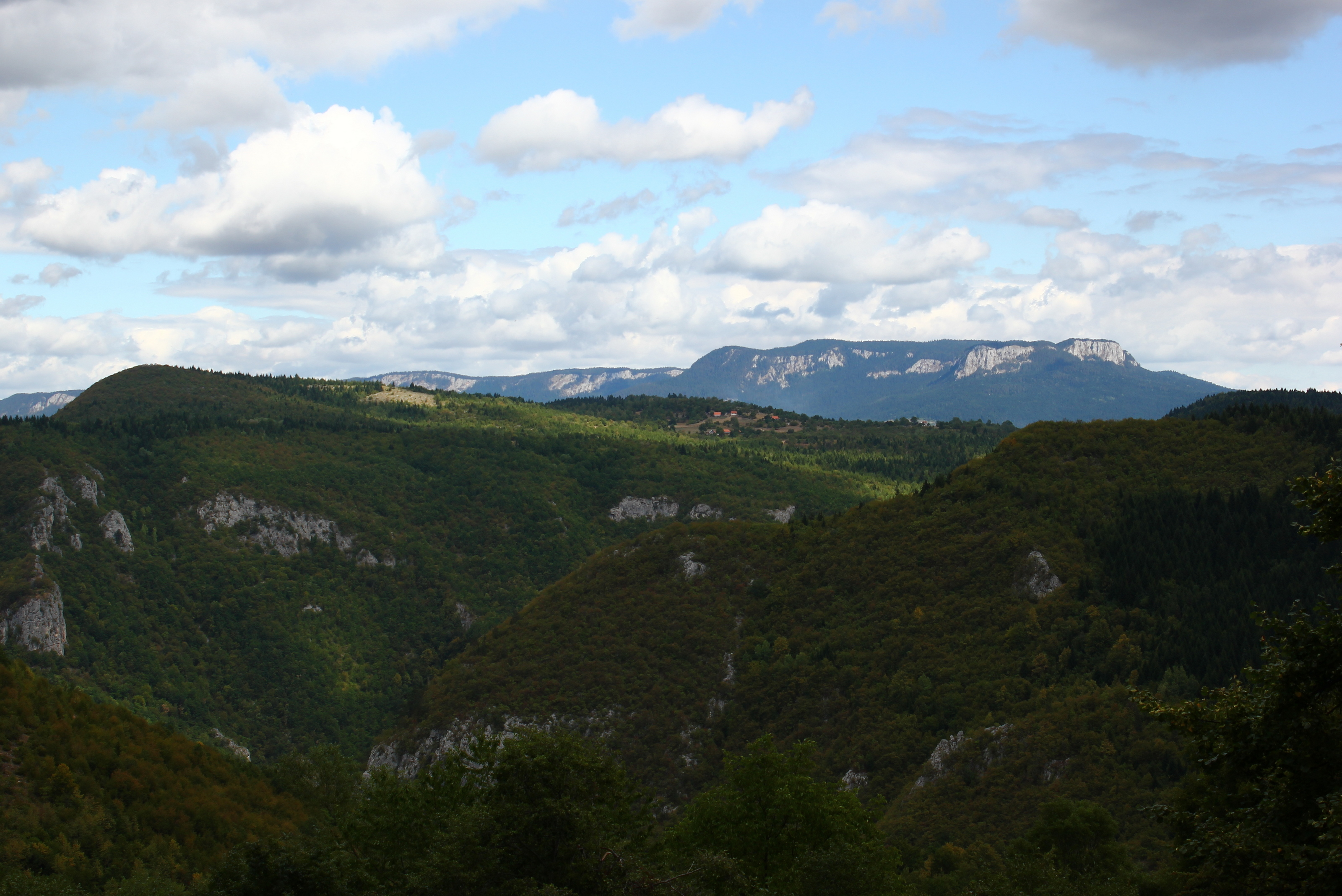 Das Gebirge Romanija östlich von Sarajevo, gesehen vom Berg Trebević.